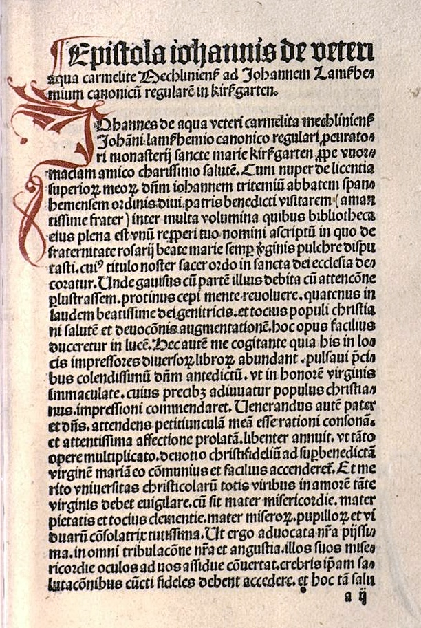 Inkunabelseite, Brief des Theologen Johannes Oudewater an den geistlichen Schriftsteller Johannes von Lambsheim, Augustiner-Chorherr im Kloster Kirschgarten, Worms, 1495 (aus Lambsheims Buch: De fraternitate rosarii)